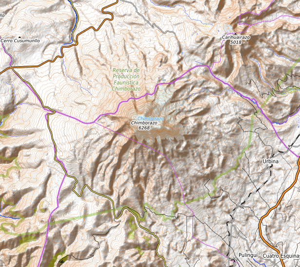 carte réalisée sur umap This map may be incomplete, and may contain errors. Don't rely solely on it for navigation.